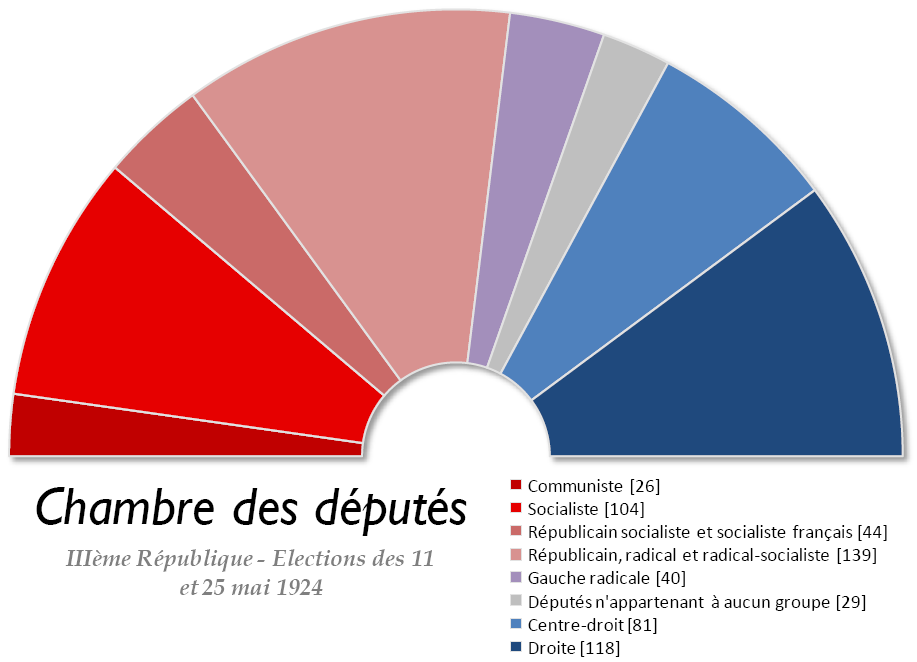 Chambre des députés française issue des élections législatives de 1924